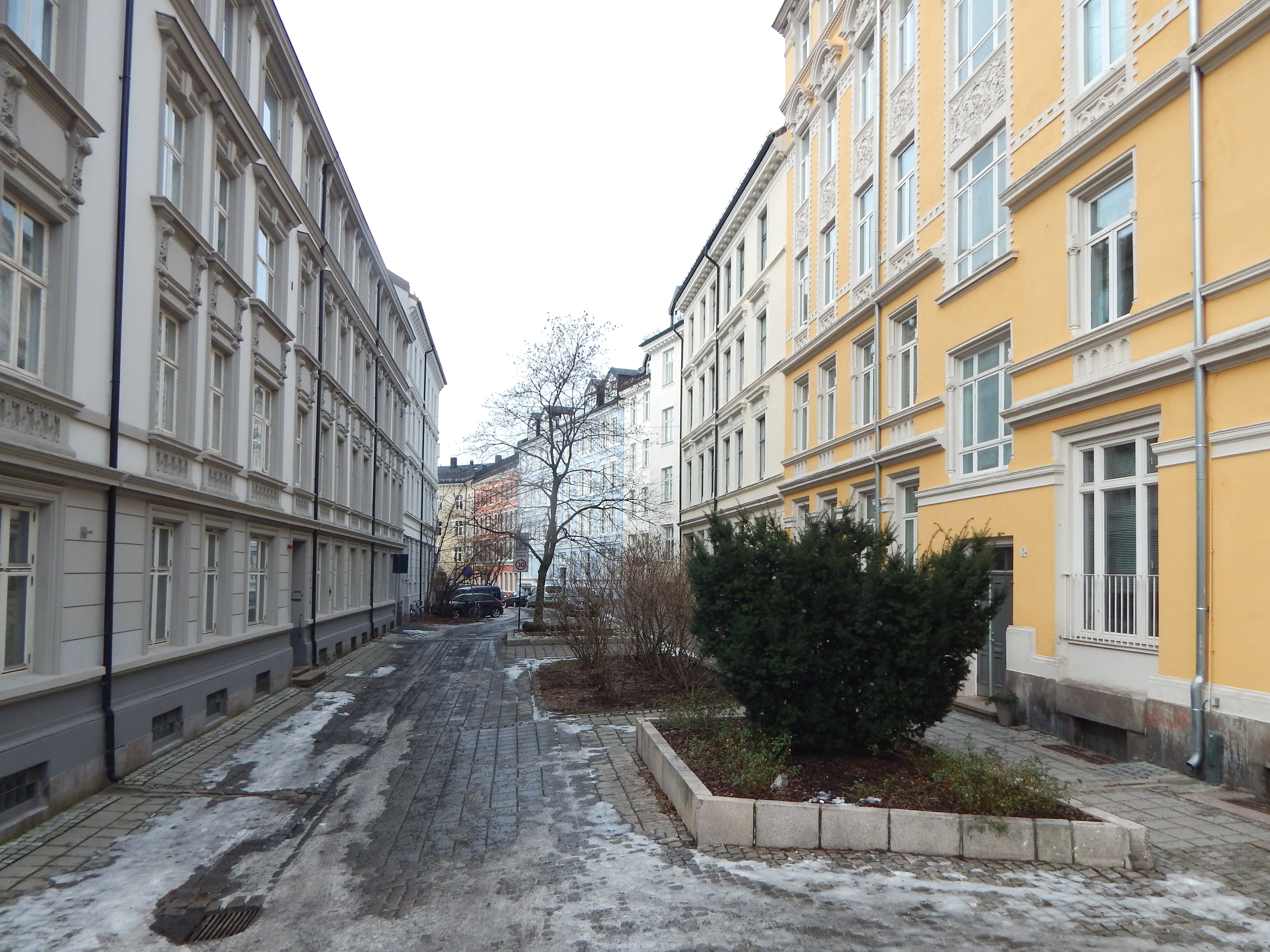 Søndre del av Krumgata